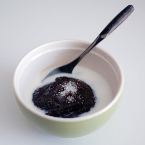 Mämmi